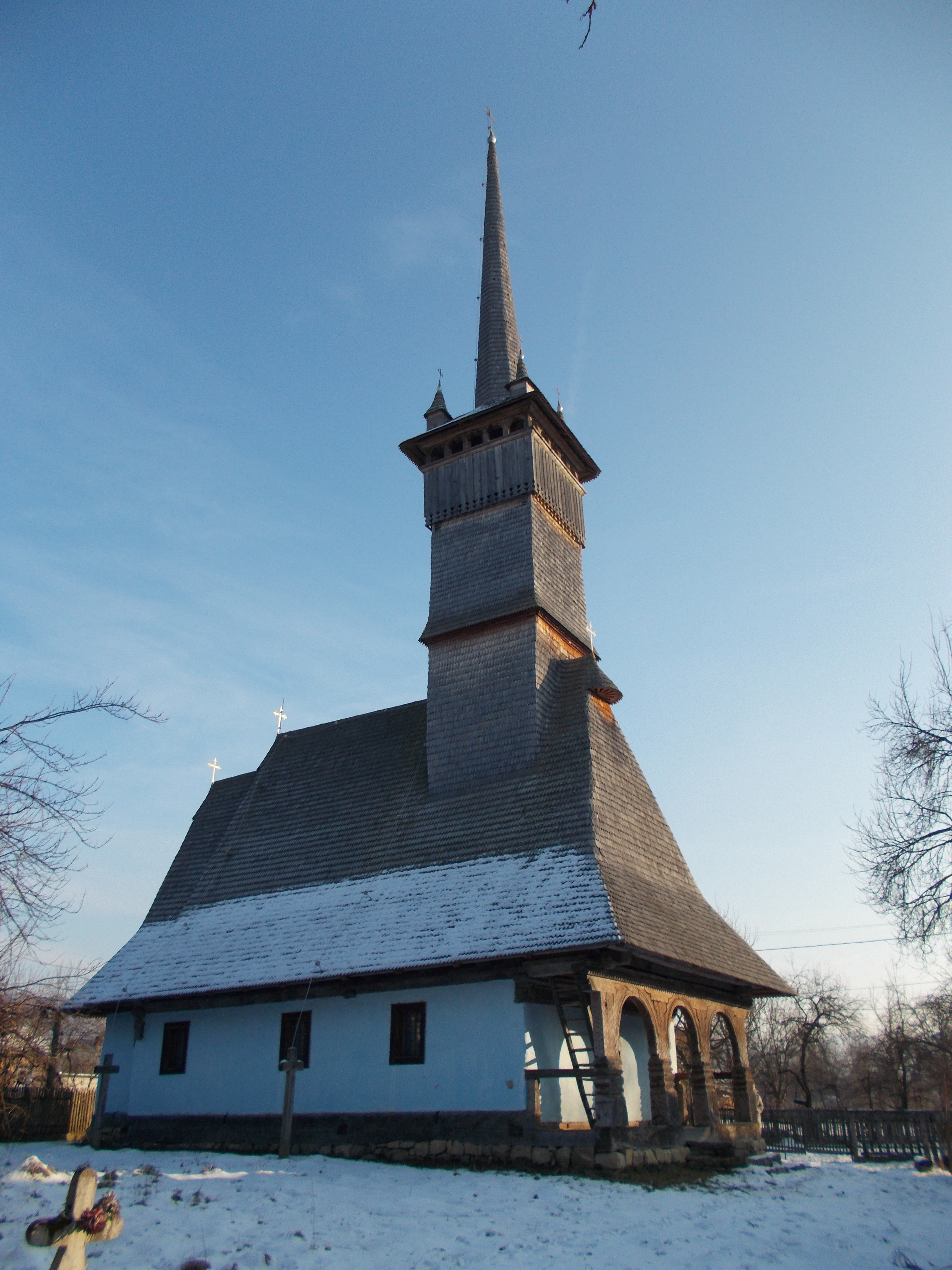 Biserica de lemn din satul Lozna, județul Sălaj